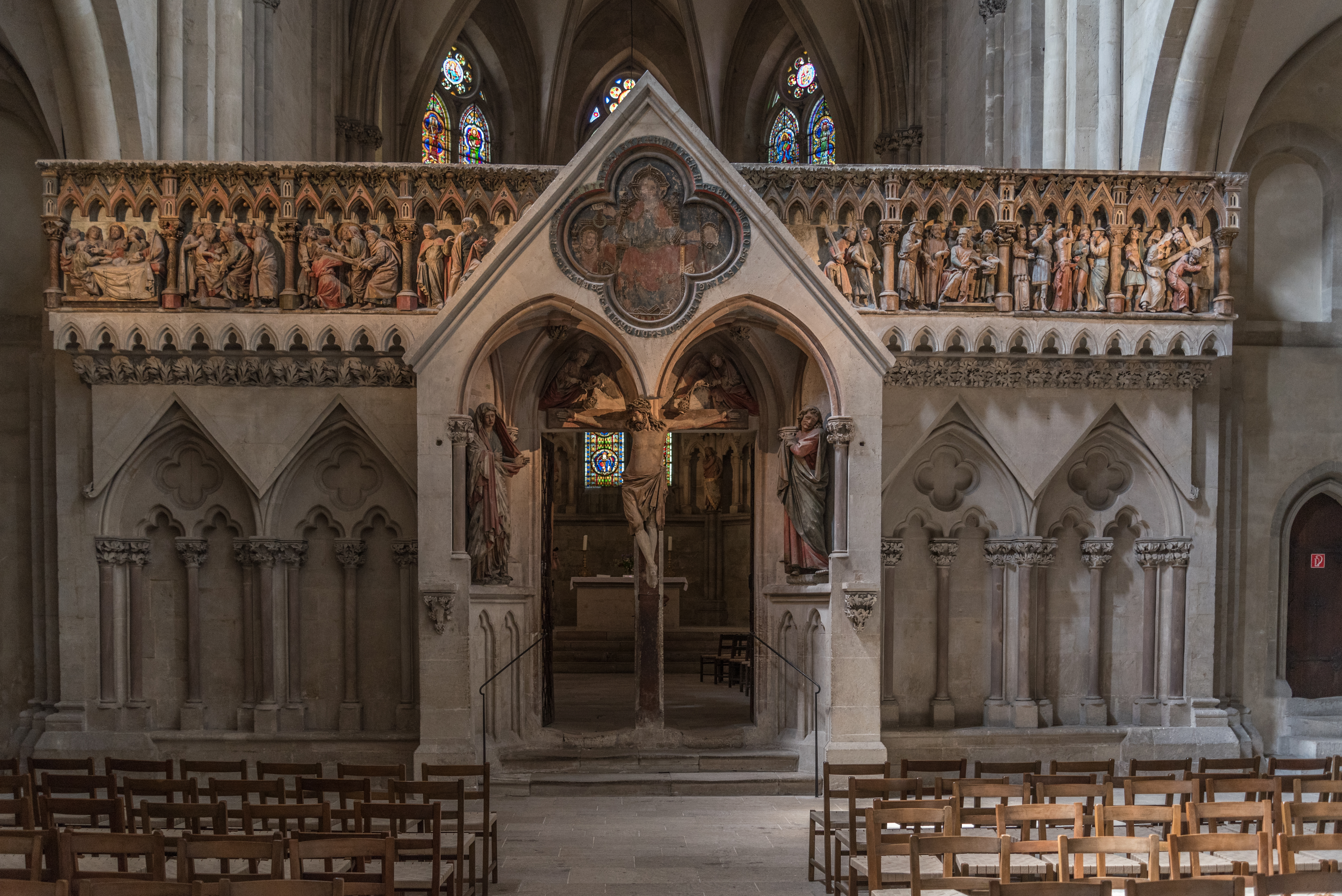 Naumburg an der Saale, Dom, Westlettner